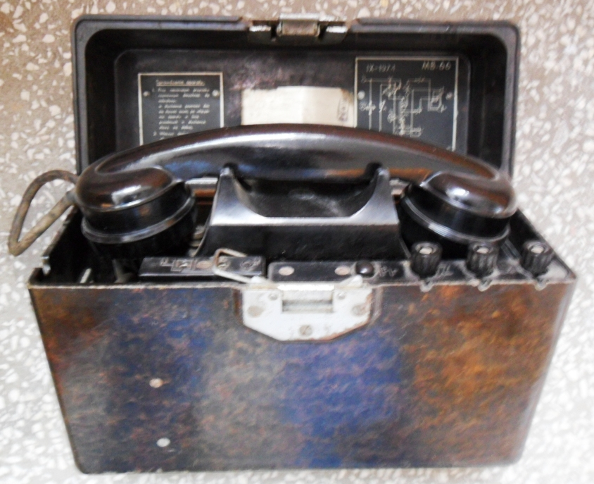 Aparat polowy